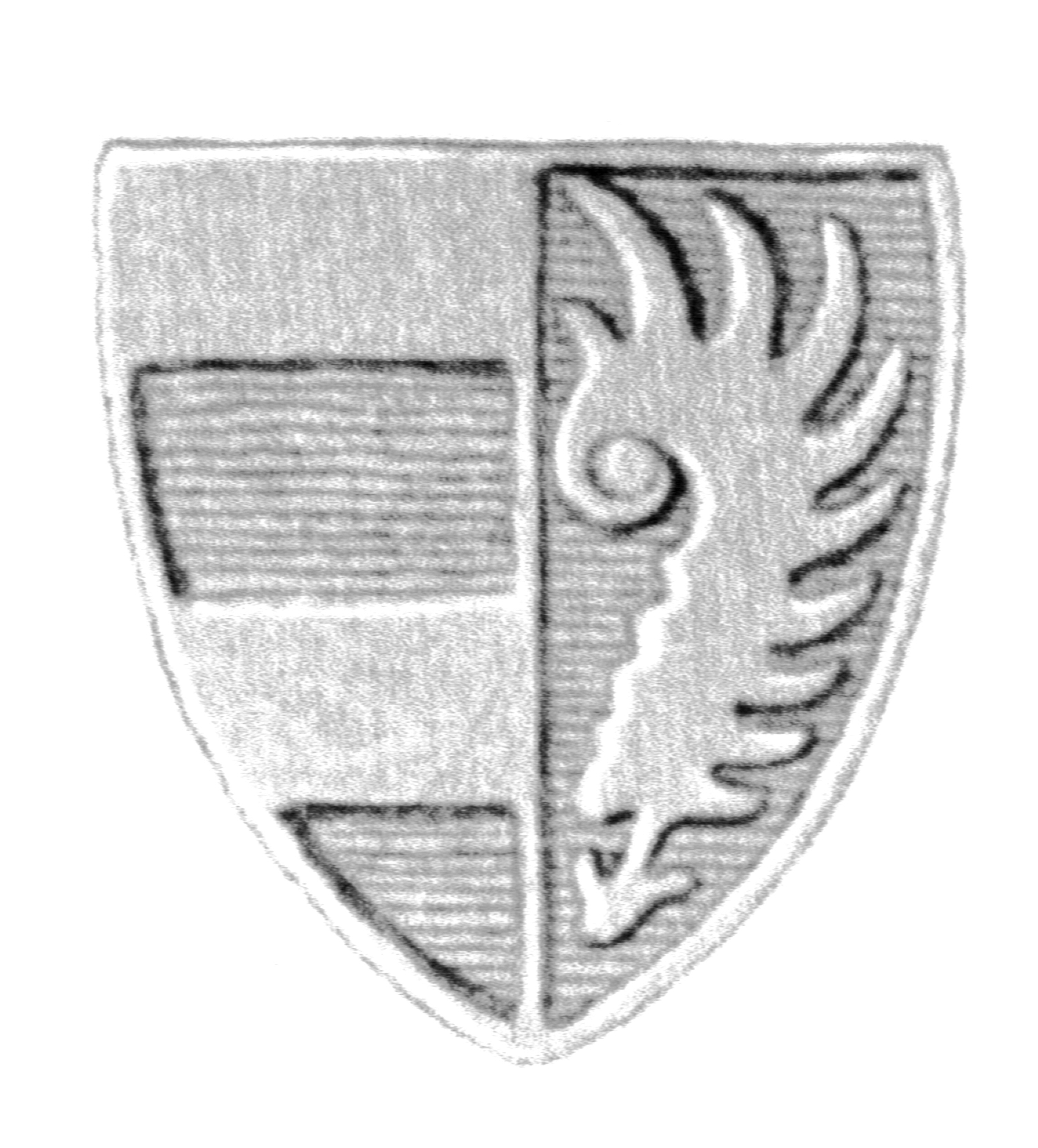 Siegel des Ratsmannes Everhart van Alen. Das Siegel stammt aus der Zeit um 1337. Siehe Emil Ferdinand Fehling: Lübeckische Ratslinie, Nr. 337 (Eberhard von Alen).